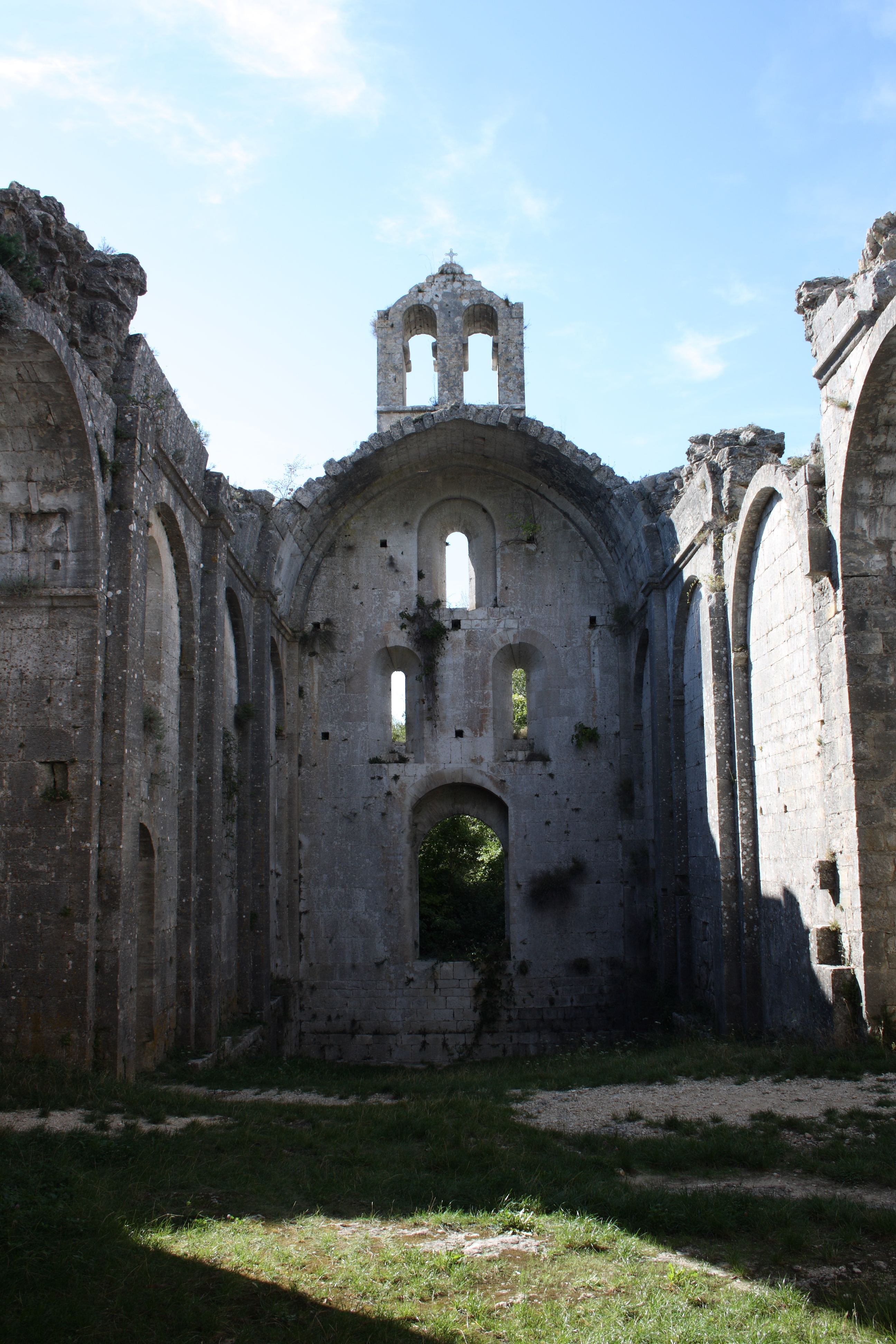 Ruine der Prioratskirche in Aleyrac